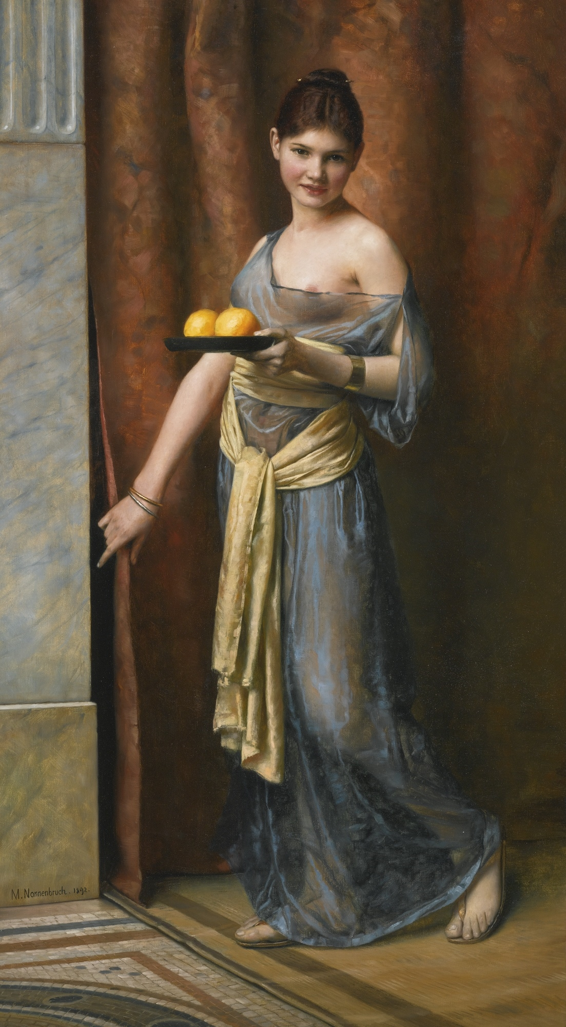 Max Nonnenbruch, Die Favoritin, Öl auf Leinwand, 111,76 × 61,6 cm